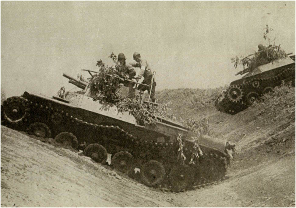 習志野原での戦車の搭乗訓練の様子